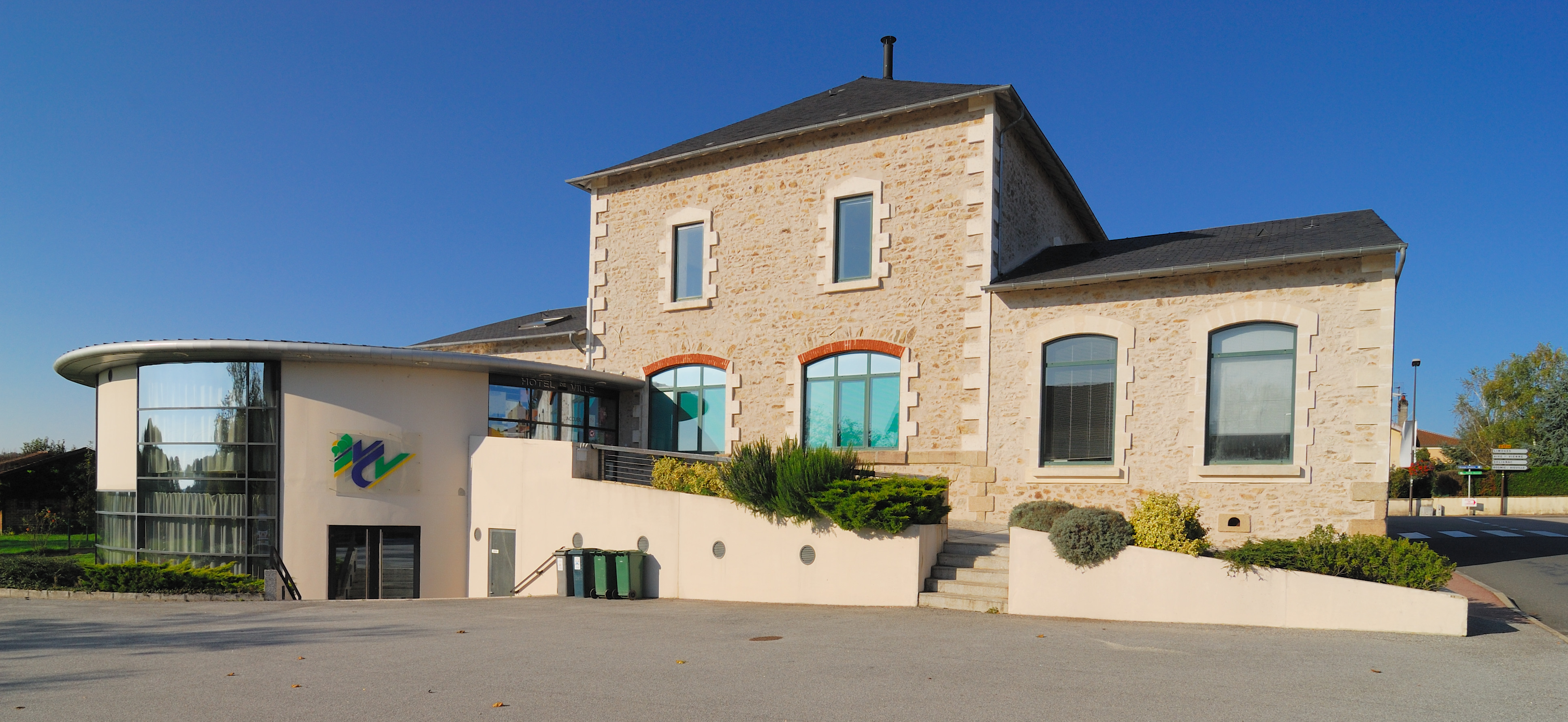 Maire de Condat vue de dos avec l'agrandissemet